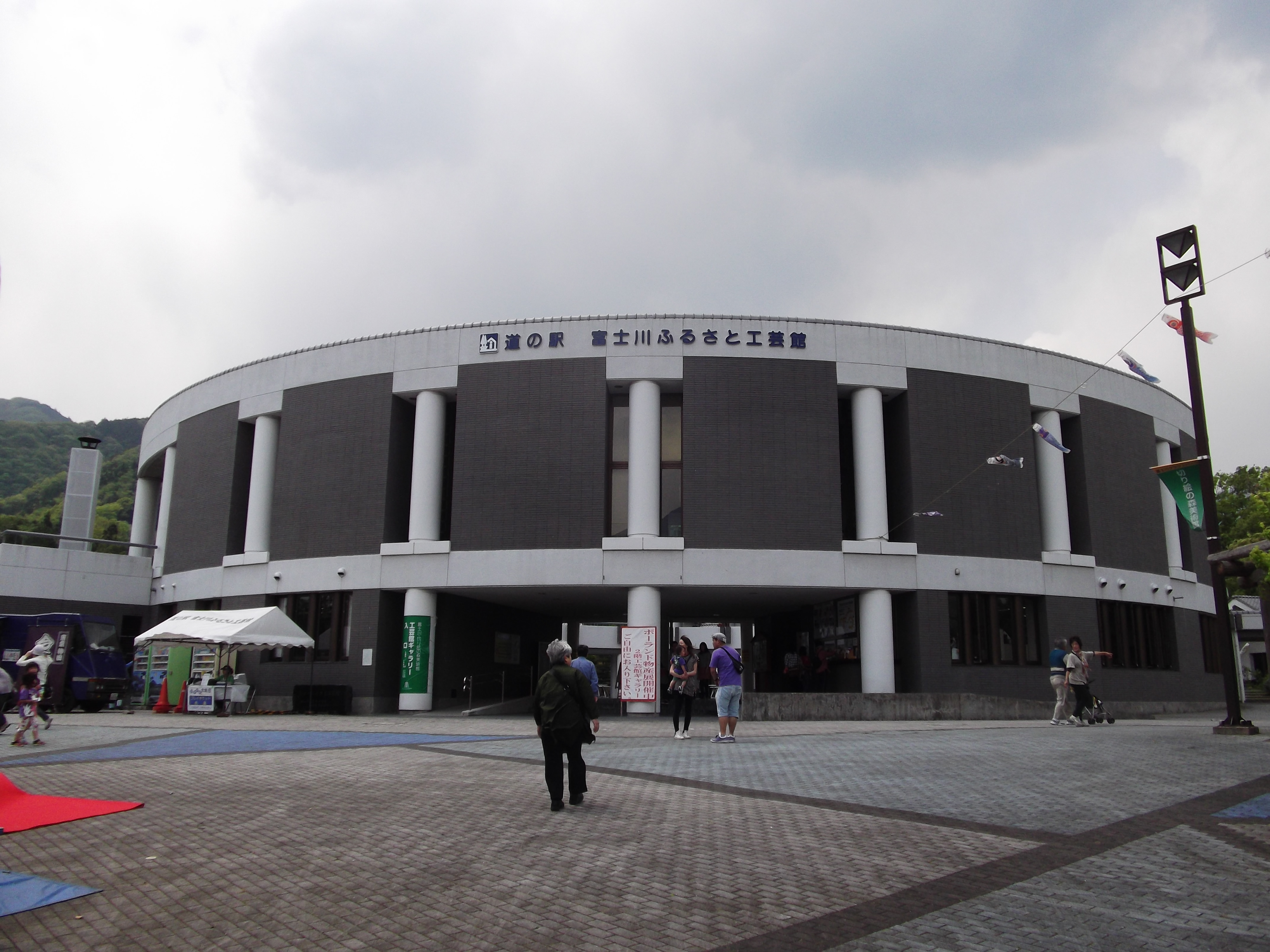 山梨県身延町の富士川クラフトパークにある道の駅富士川ふるさと工芸館